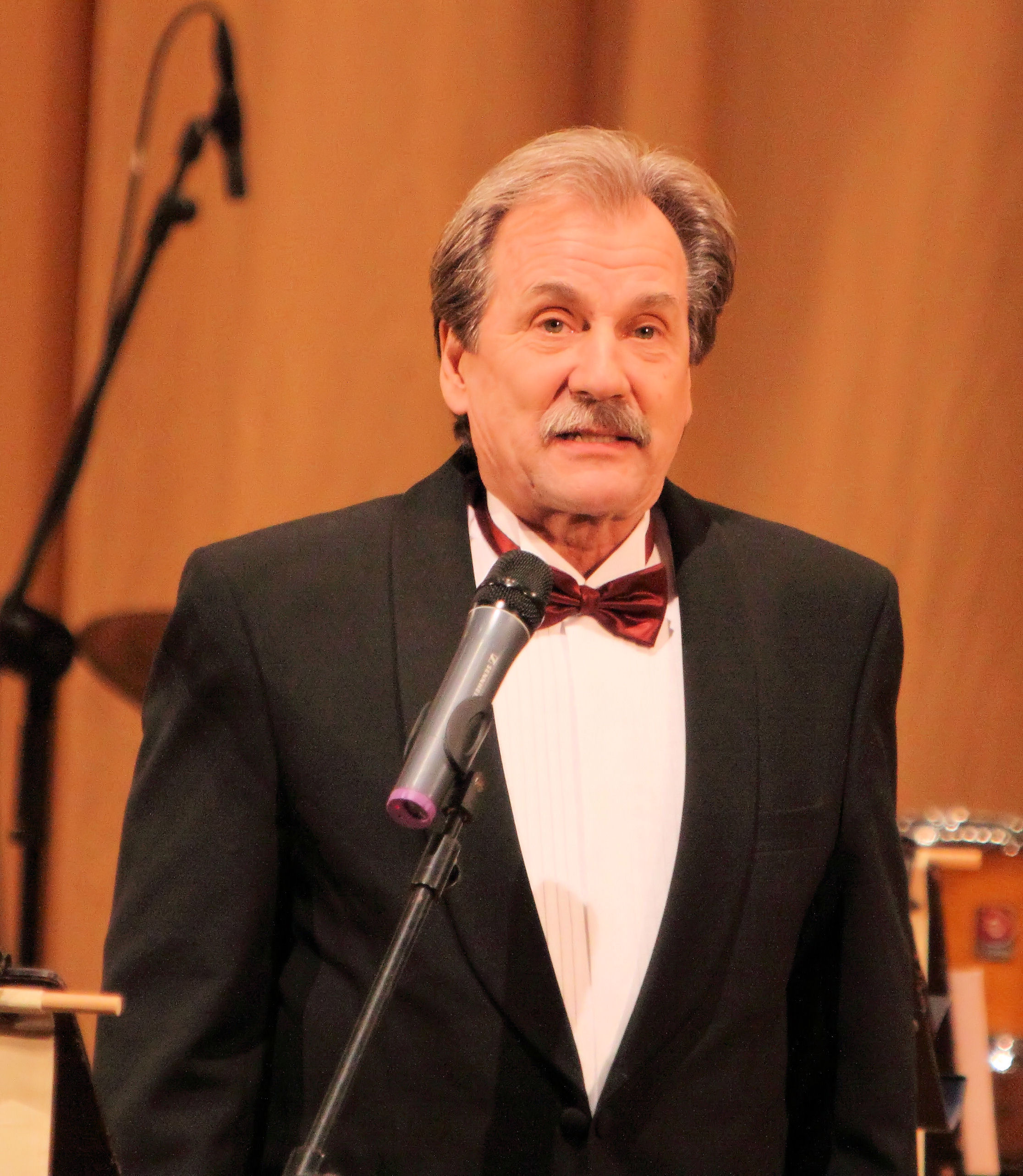 Erkki LIikanen, suomalainen laulaja ja rumpali